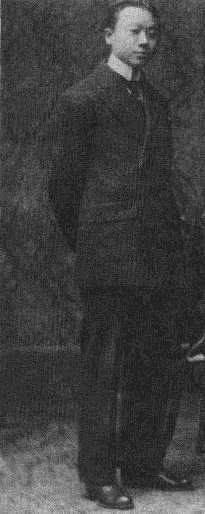 吳匡時肖像